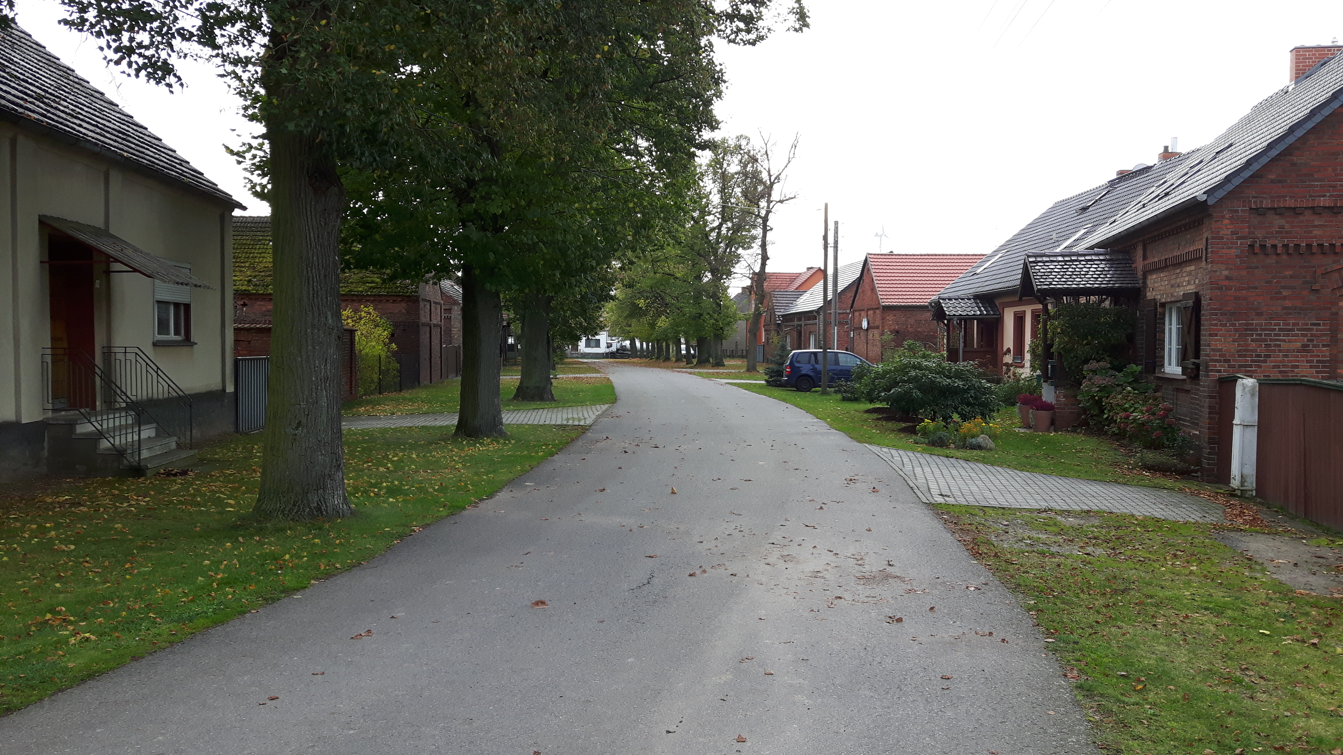 Siegadel.